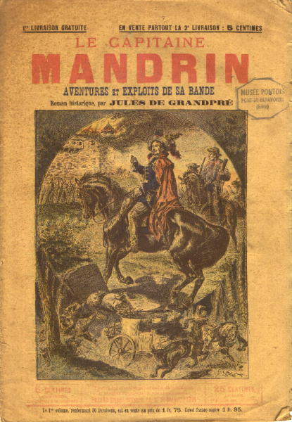 Couverture journal "Le Capitaine Mandrin"